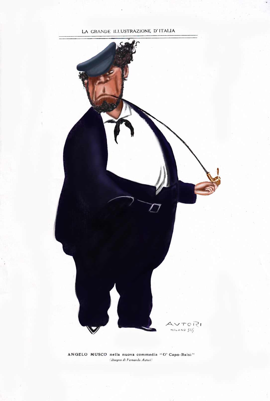 Caricatura di Angelo Musco eseguita da Fernando Autori (1886 - 1937).